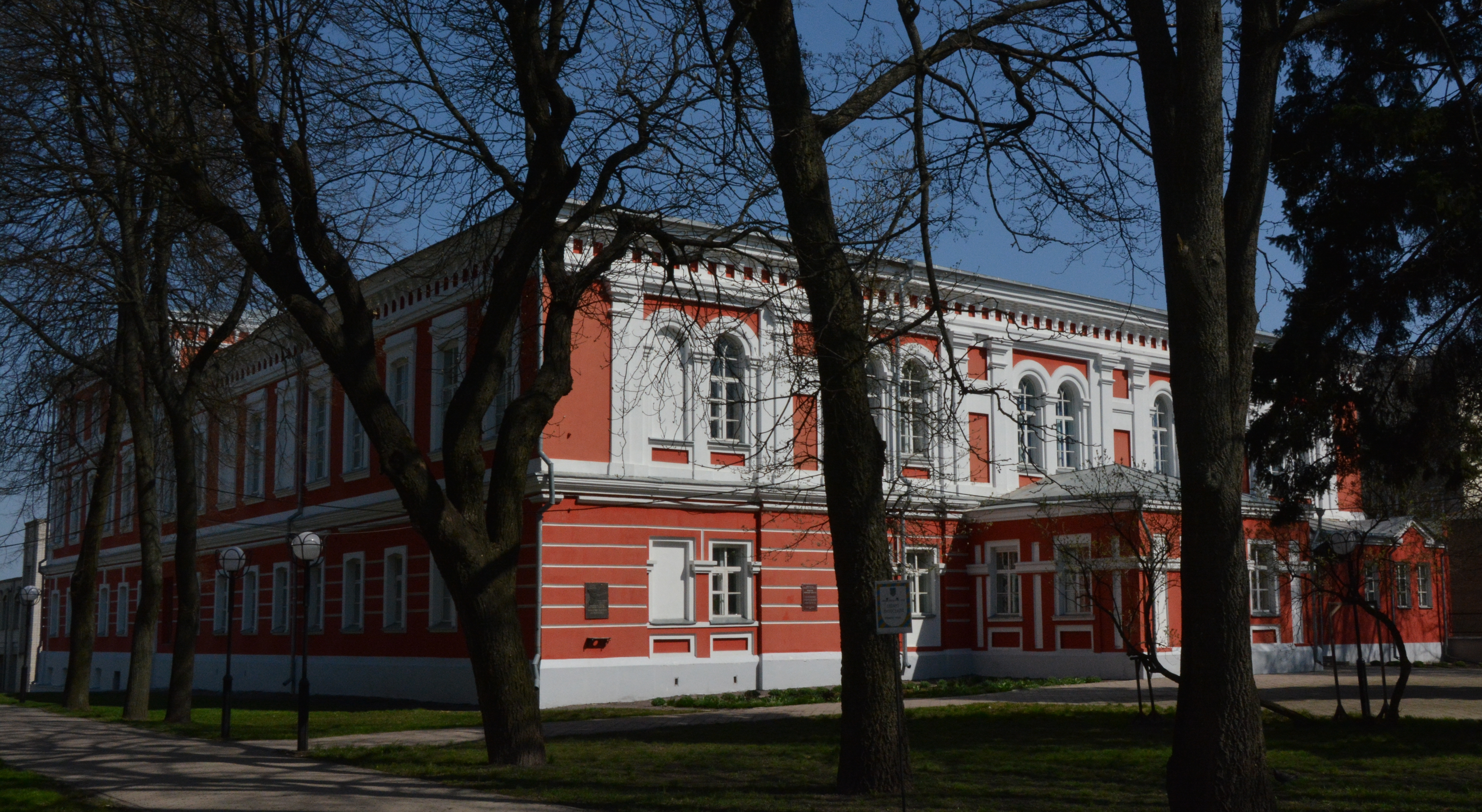 Глухівський учительський інститут, Глухів, вул. Києво-Московська, 24